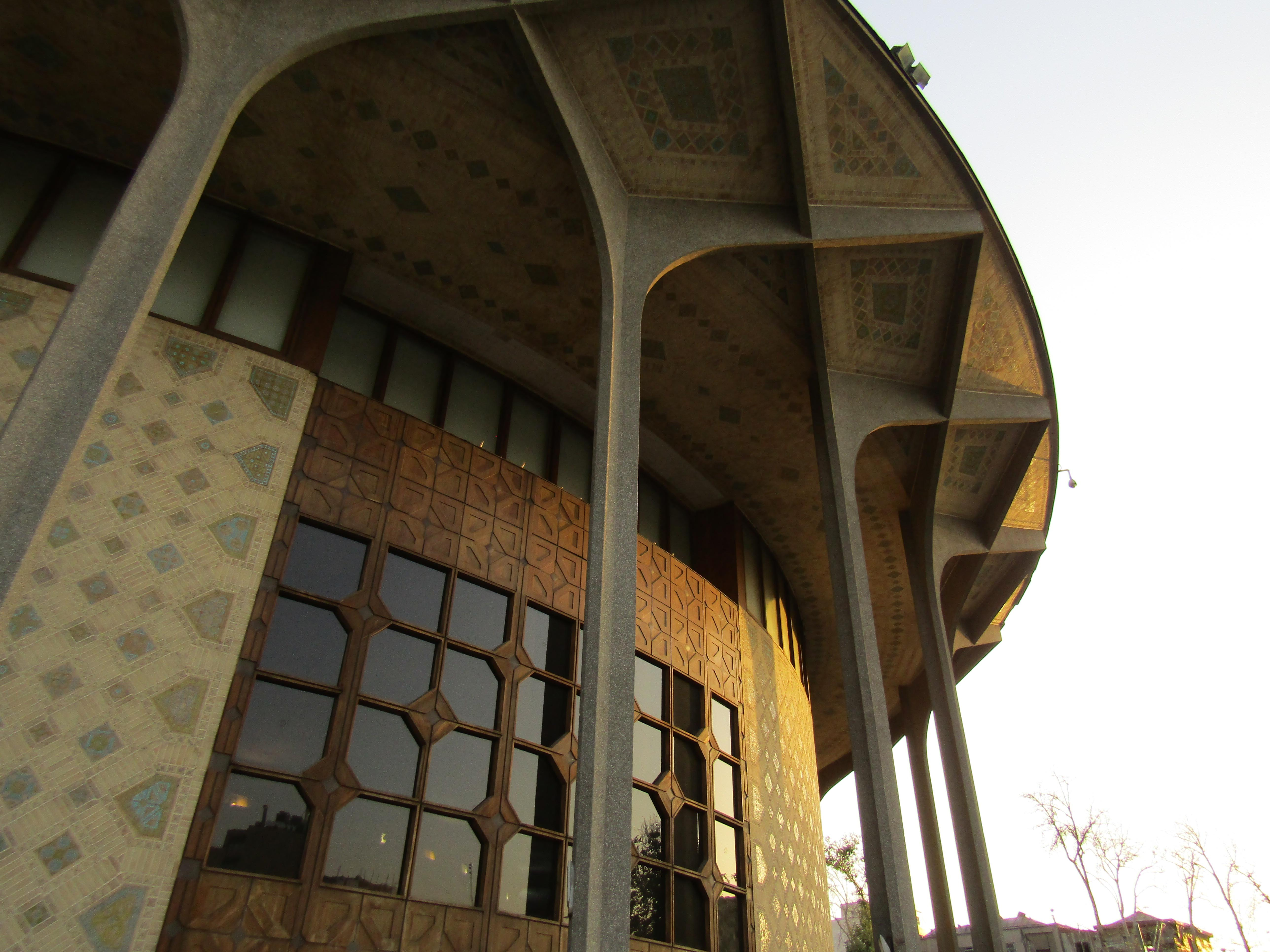 تئاتر شهر